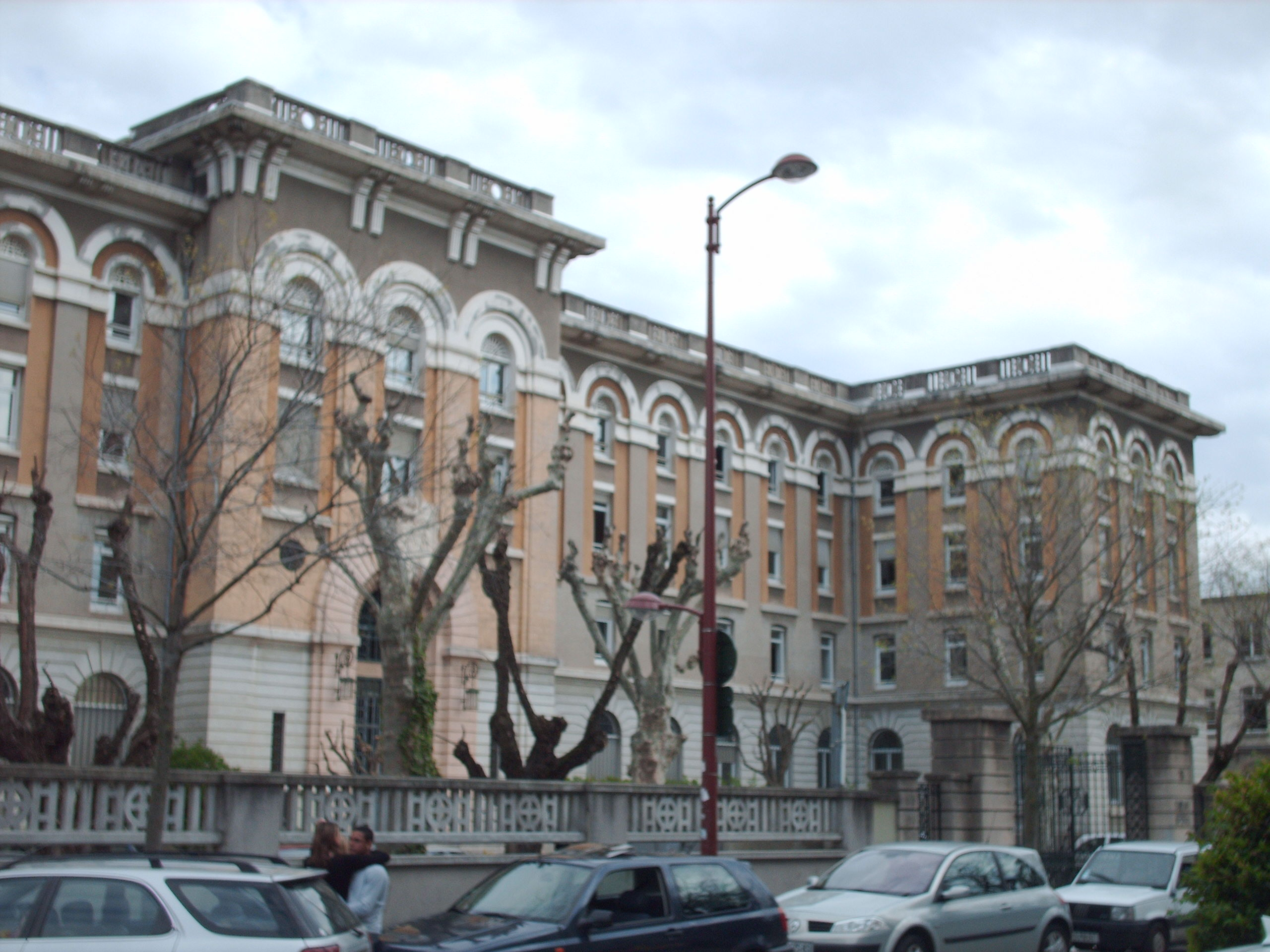 Façade de l'ancien Grand séminaire,Lycée Privé Catholique Montplaisir de Valence (Drôme, France, UE)